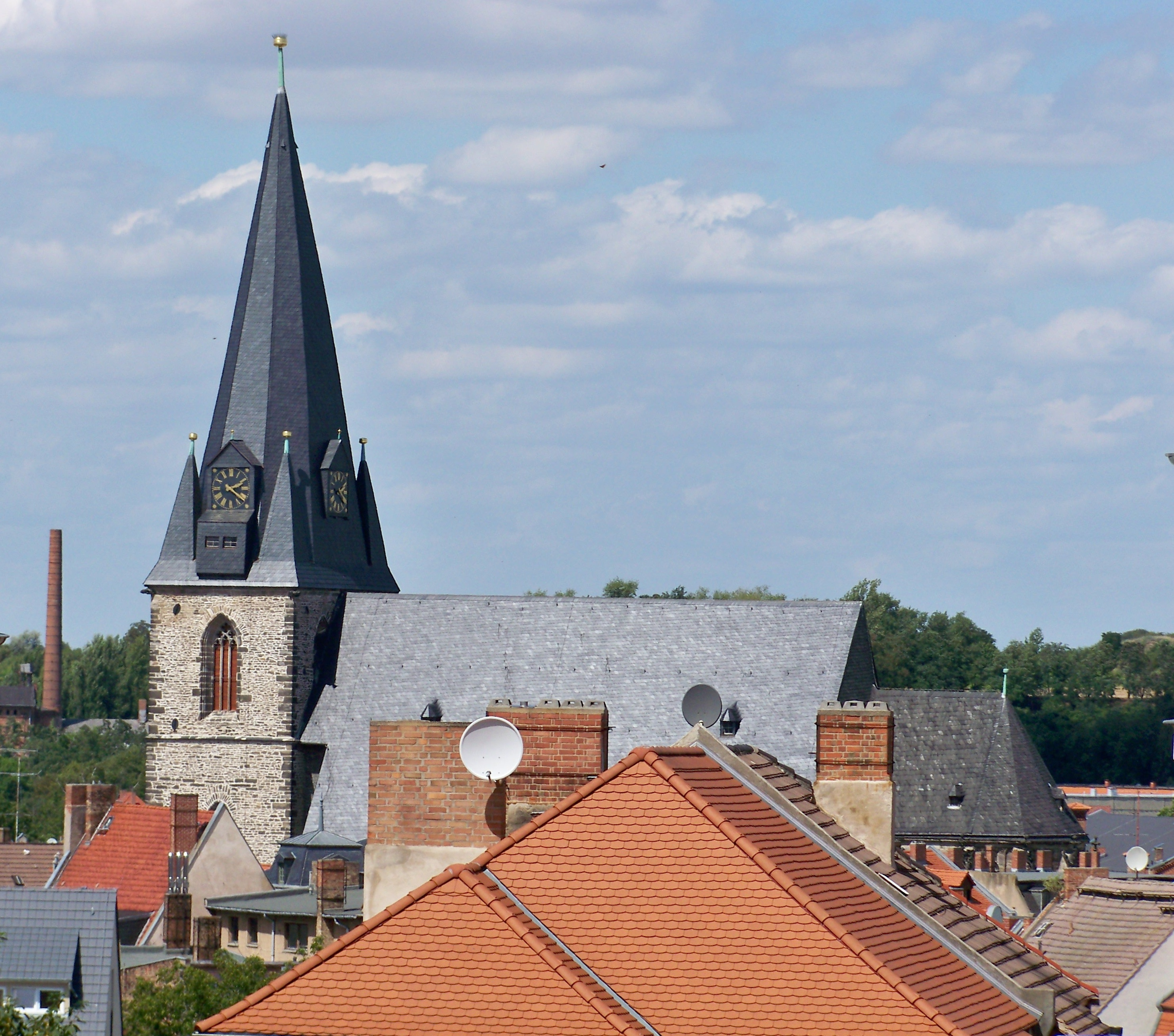 Marienkirche in Bernburg (Saale)